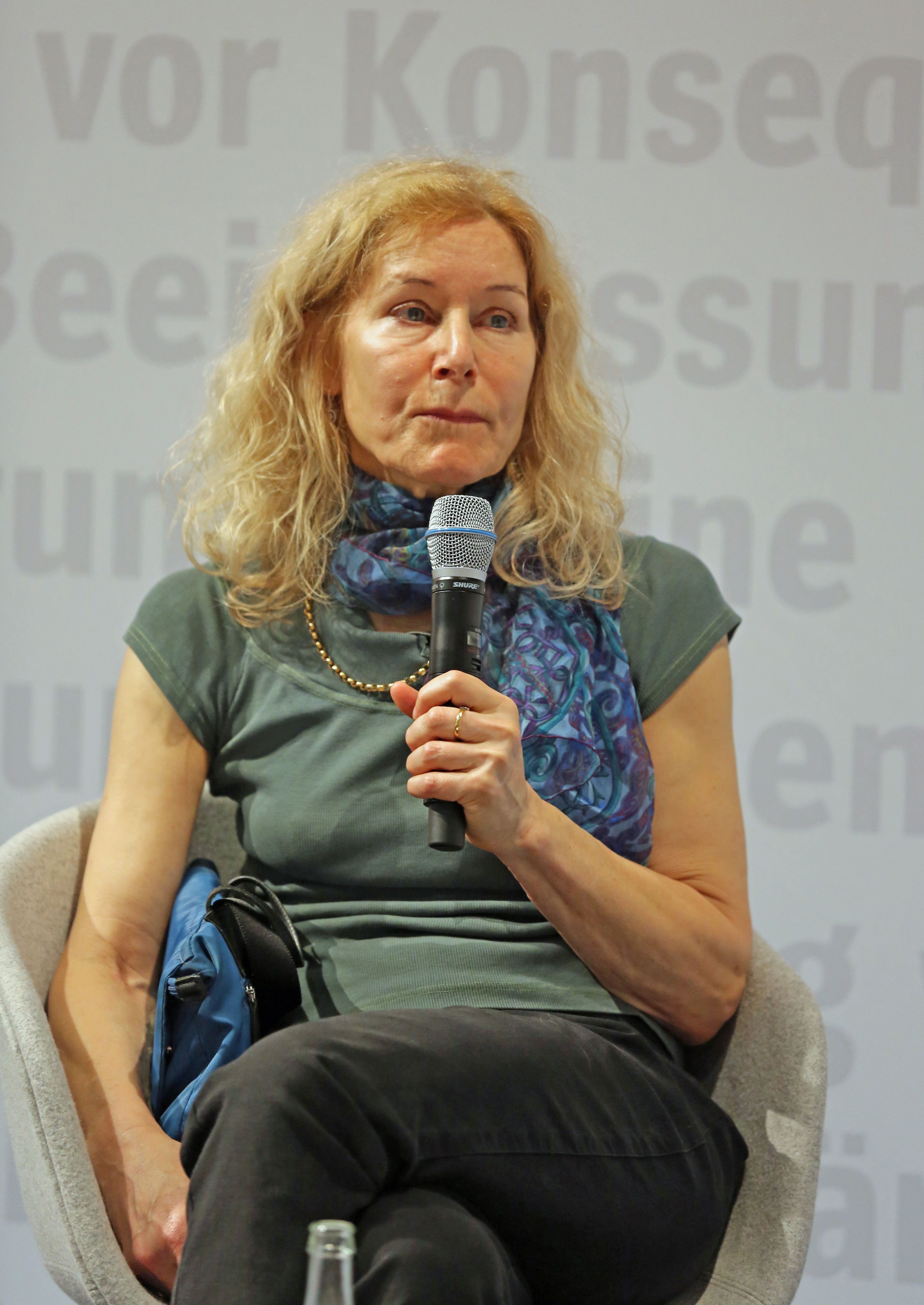 Irene Dische bei der Frankfurter Buchmesse 2017